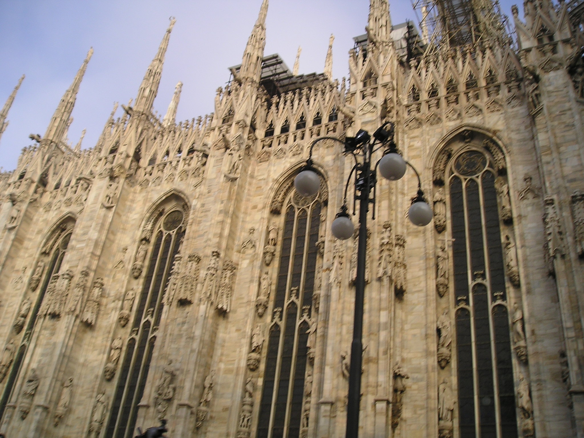 Una foto del duomo di Milano, Italy